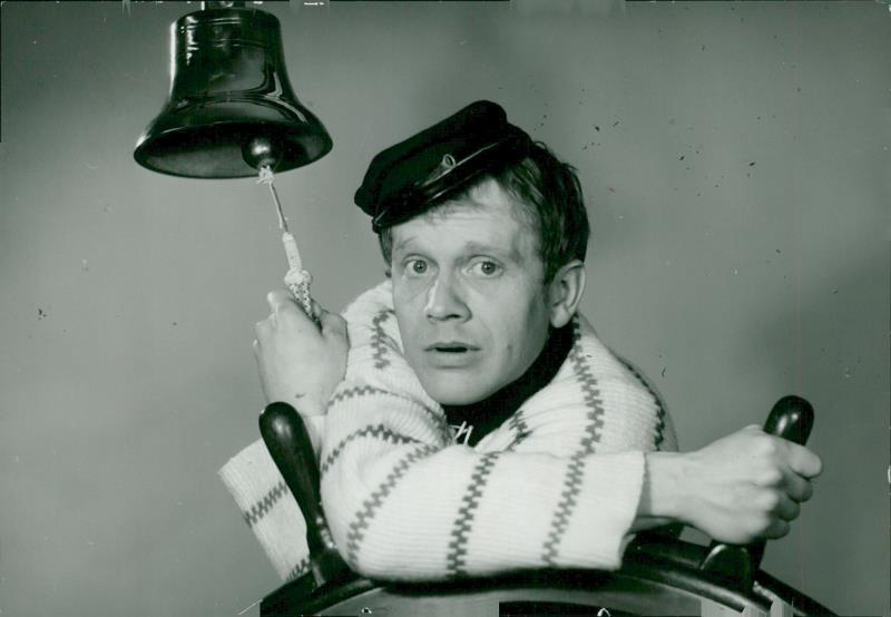 Foto på Per Myrberg infört i Svenska Dagbladet 1964-12-07 s. 12.